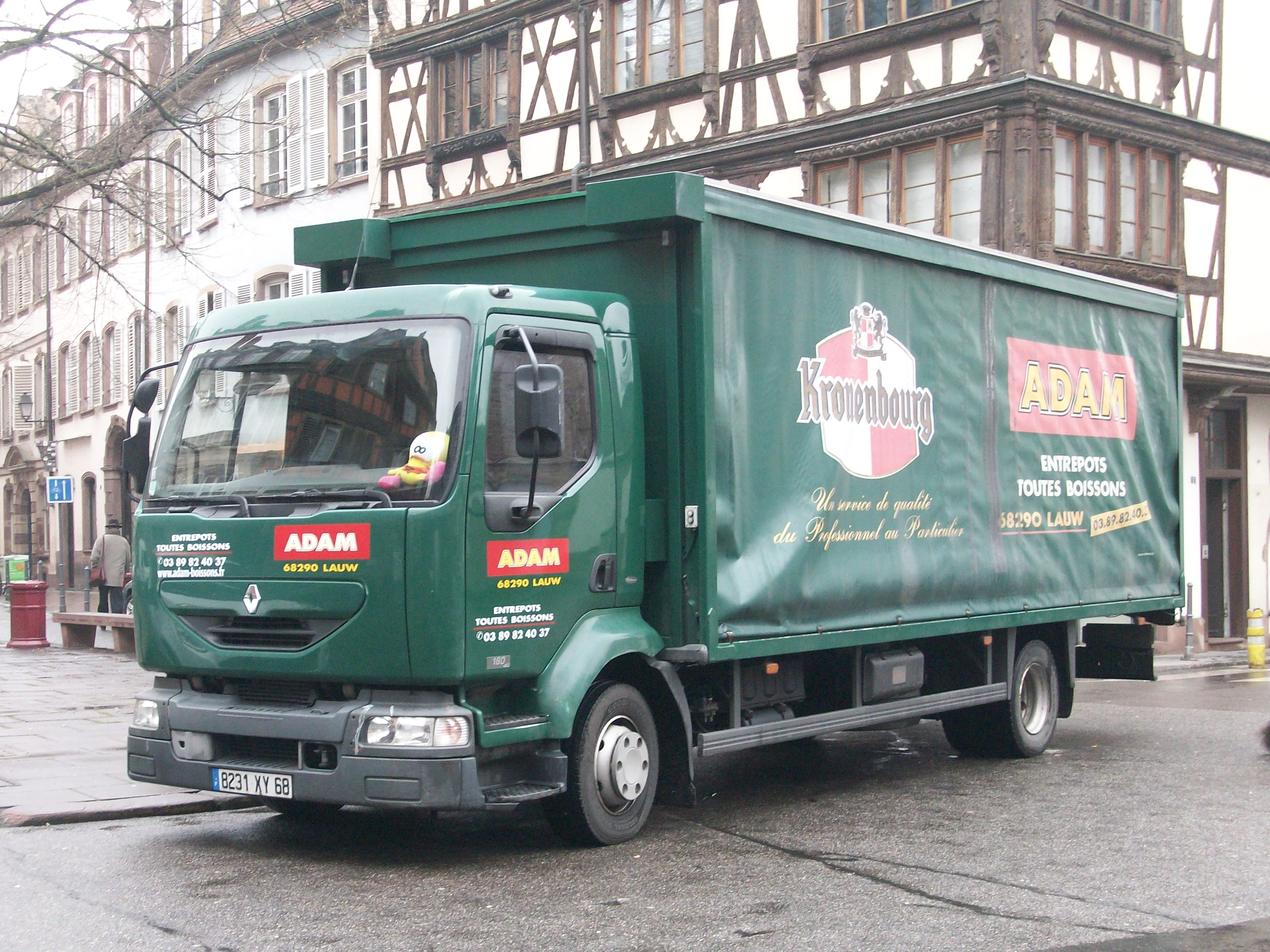 Renault Midlum de boisson Adam, Strasbourg